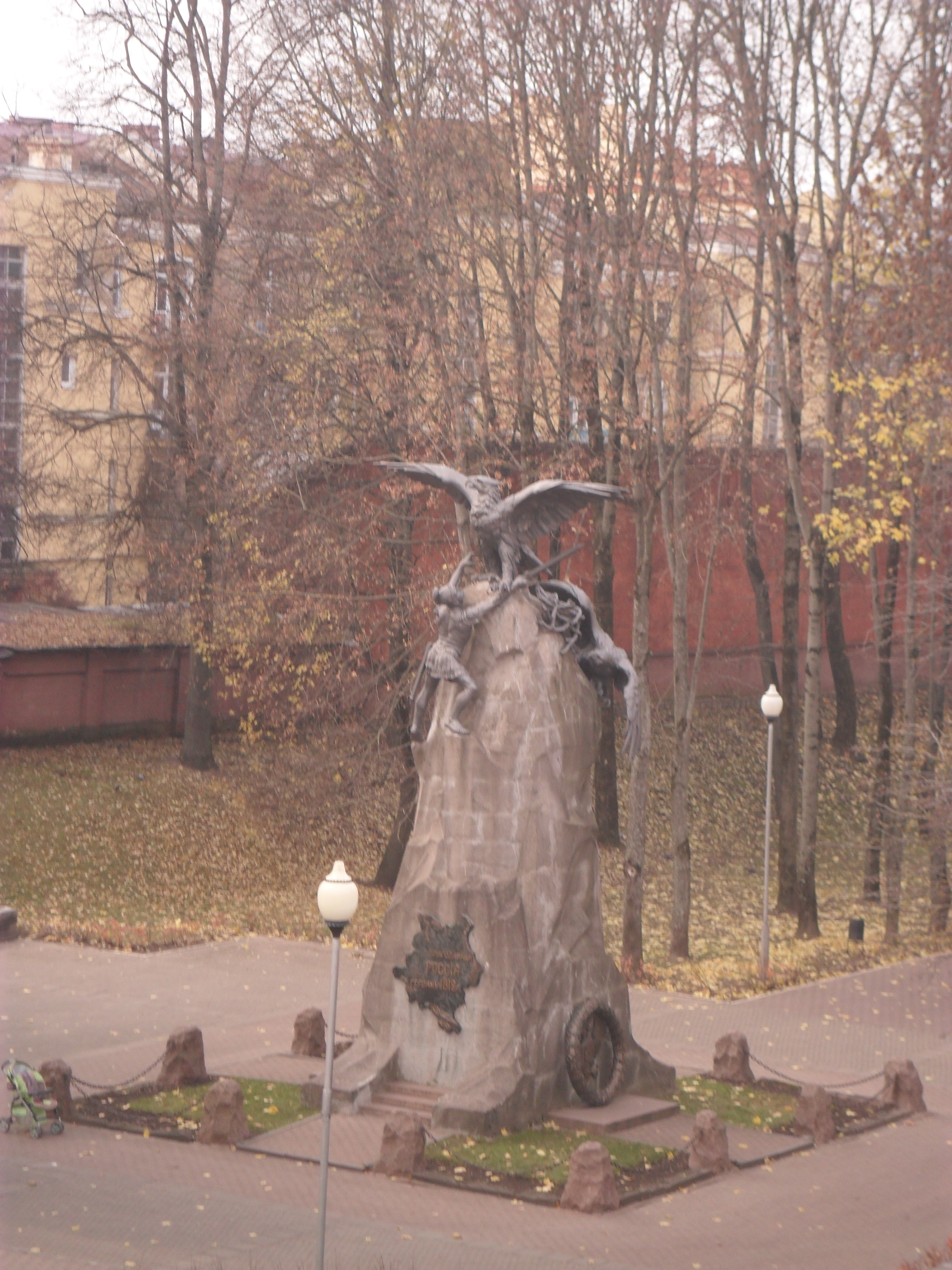 Памятник "Благодарная Россия". Вид с крепостной стены.